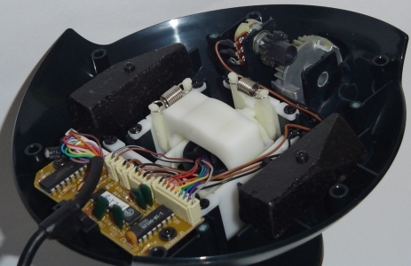 Dżojstik - widok na potencjometr przepustnicy